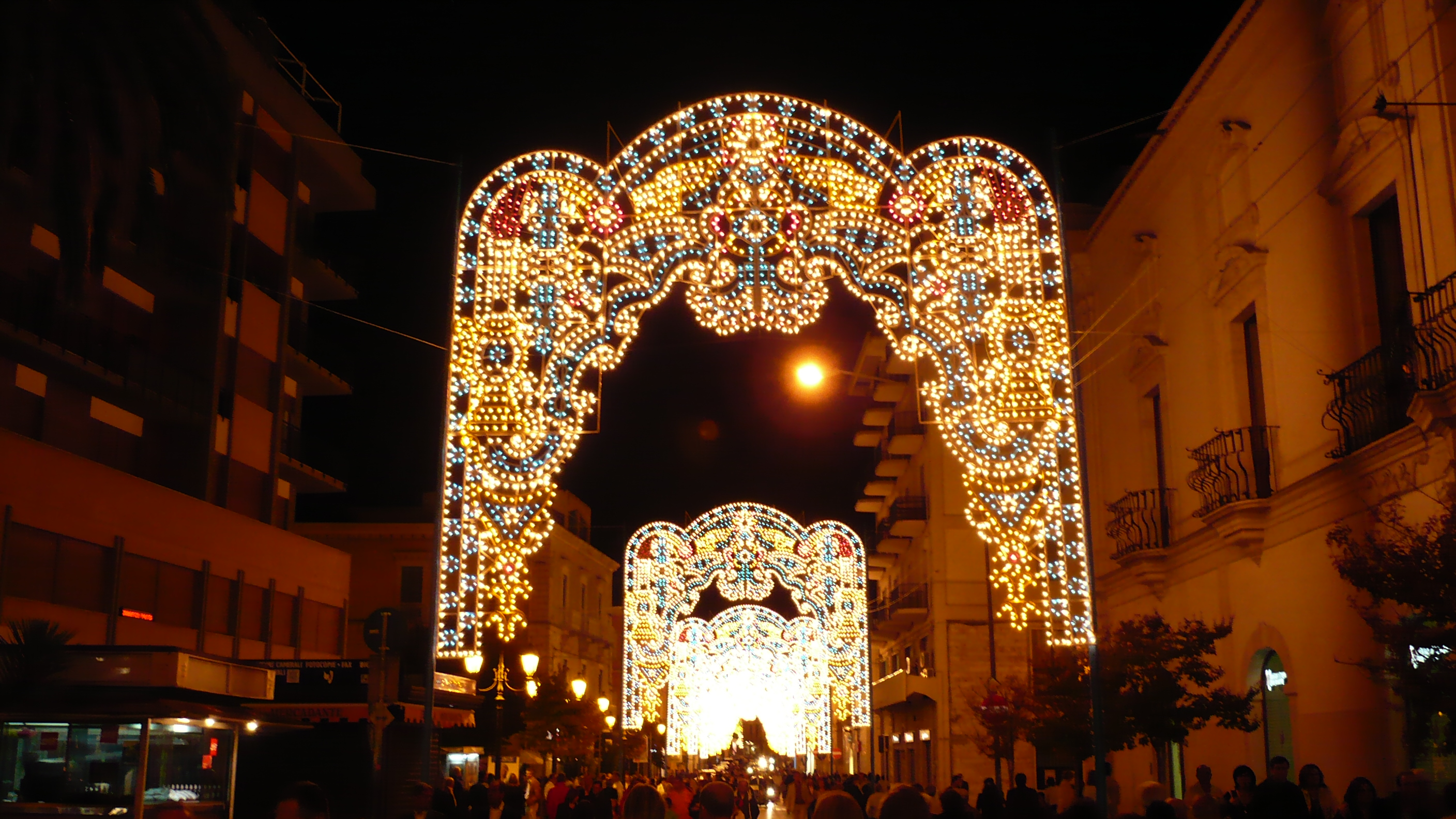 Corso Garibaldi decorato durante la festa patronale